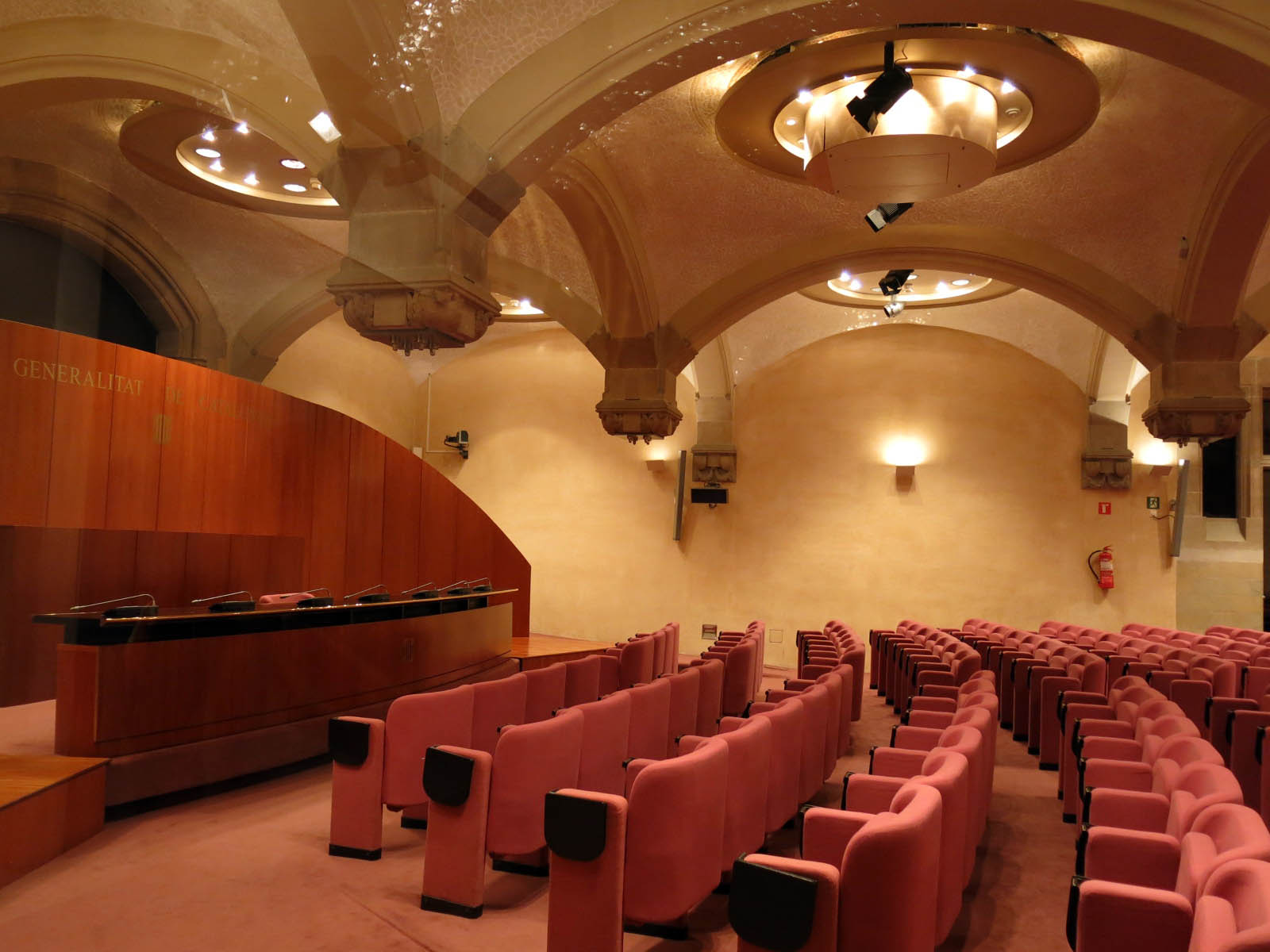 Palau de la Generalitat (Barcelona) Object location41° 22′ 58.01″ N, 2° 10′ 36.01″ E